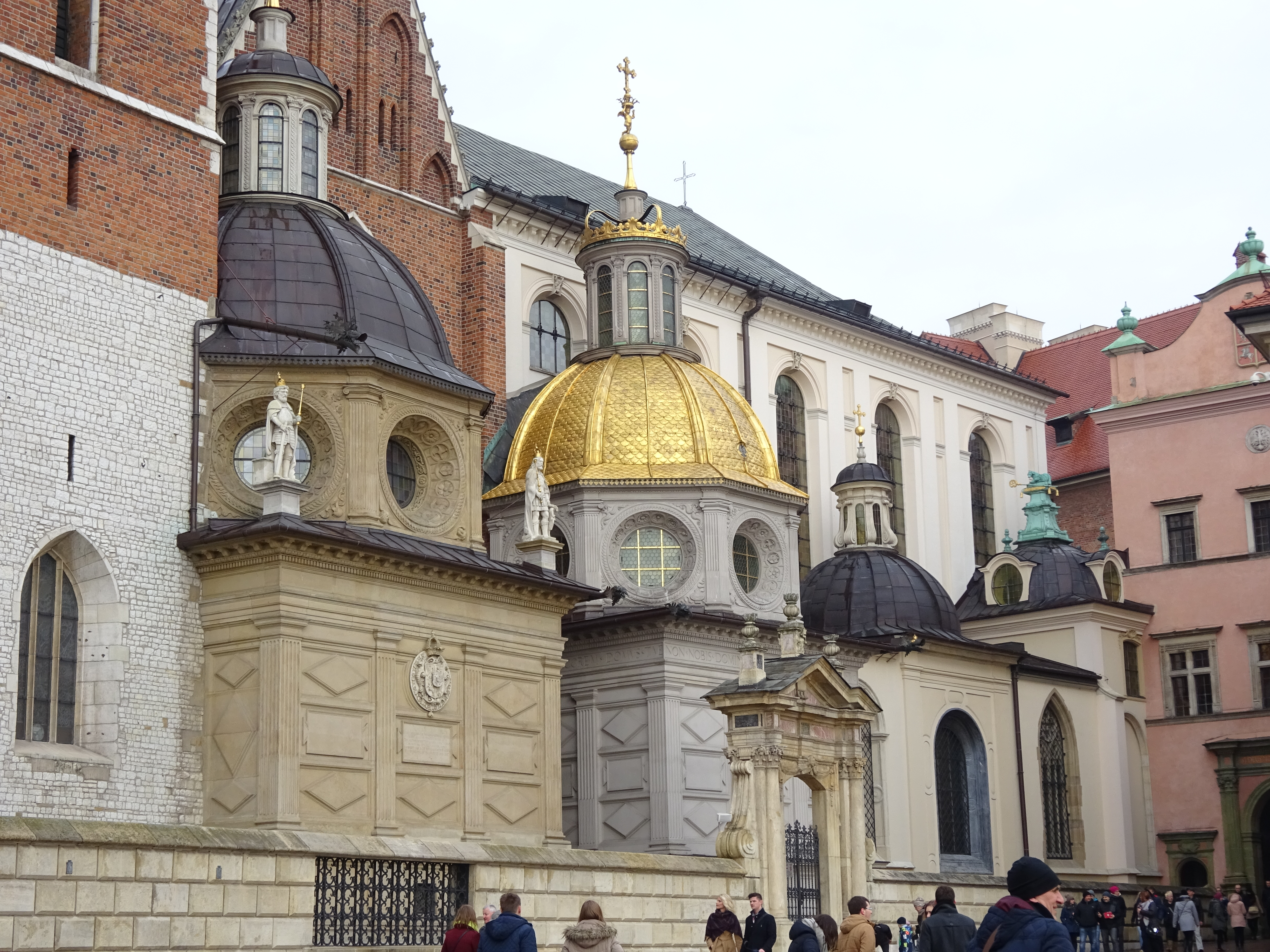 Kaplice Katedry na Wawelu od strony południowej: Wazów, Zygmuntowska, Konarskiego, Zadzika, Jana Olbrachta i Załuskiego. 2016